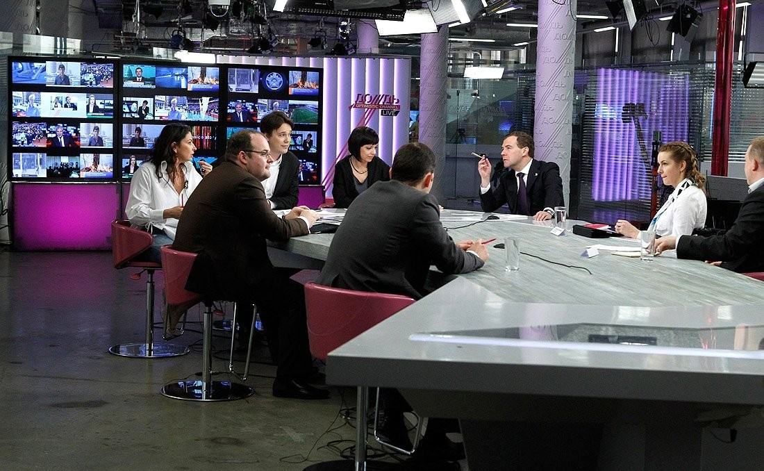 Посещение студии телеканала «Дождь»